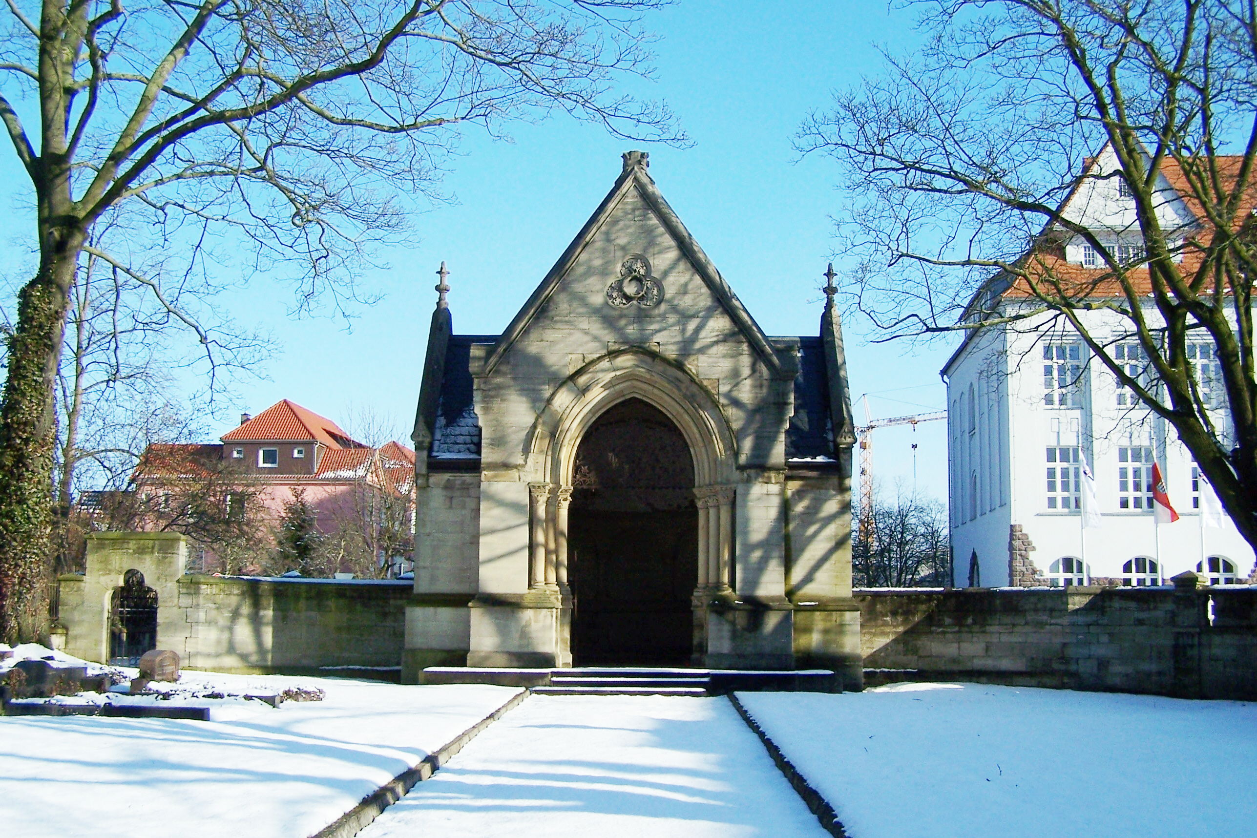 Blick zur Kapelle an der Südostecke des Hauptfriedhofes.